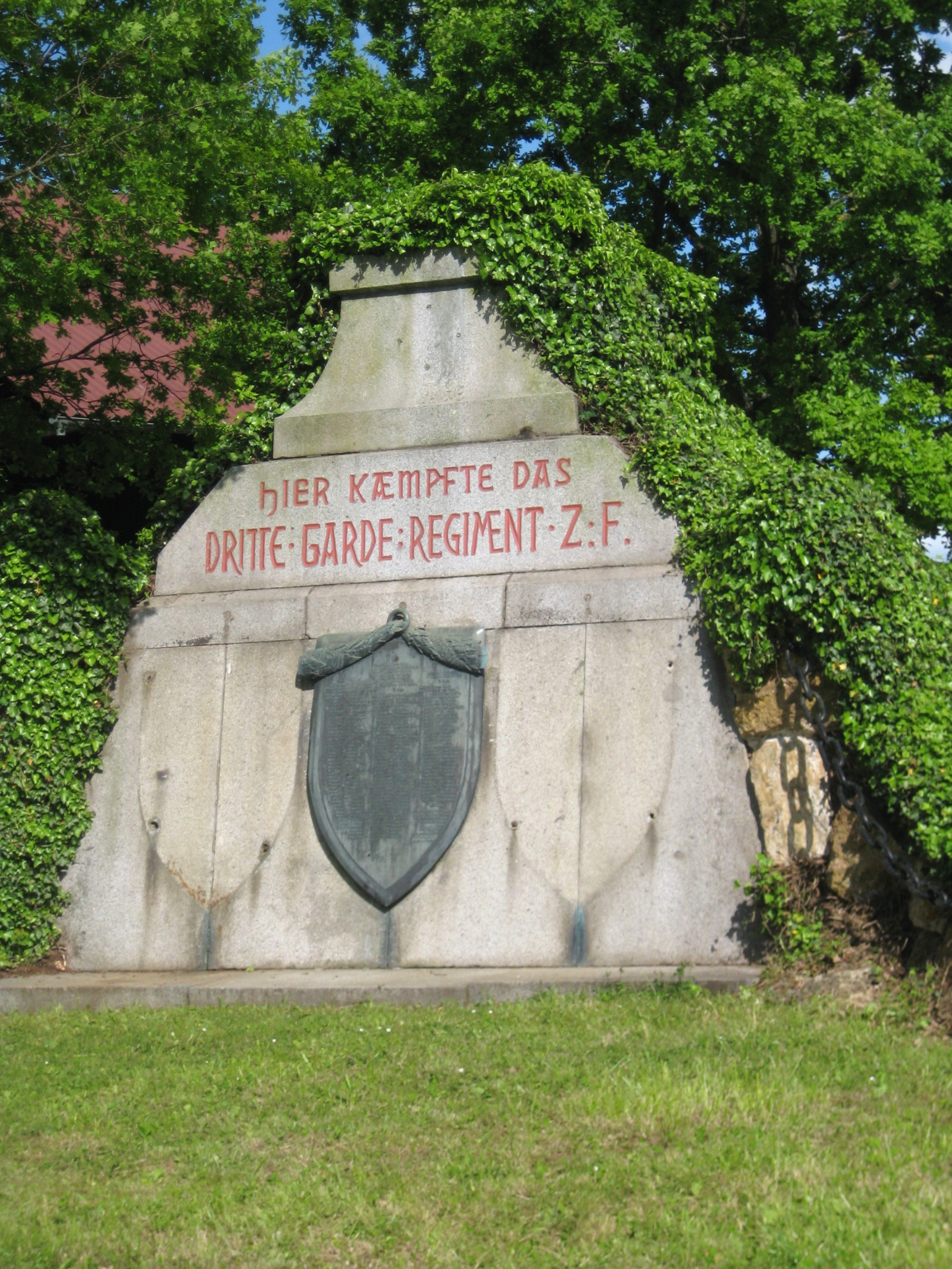 Description Monument de 1870 de Saint Privat la Montagne Date22 May 2009Sourcemon appareil photoAuthorAimelaime Monument de 1870 de Saint Privat la Montagne